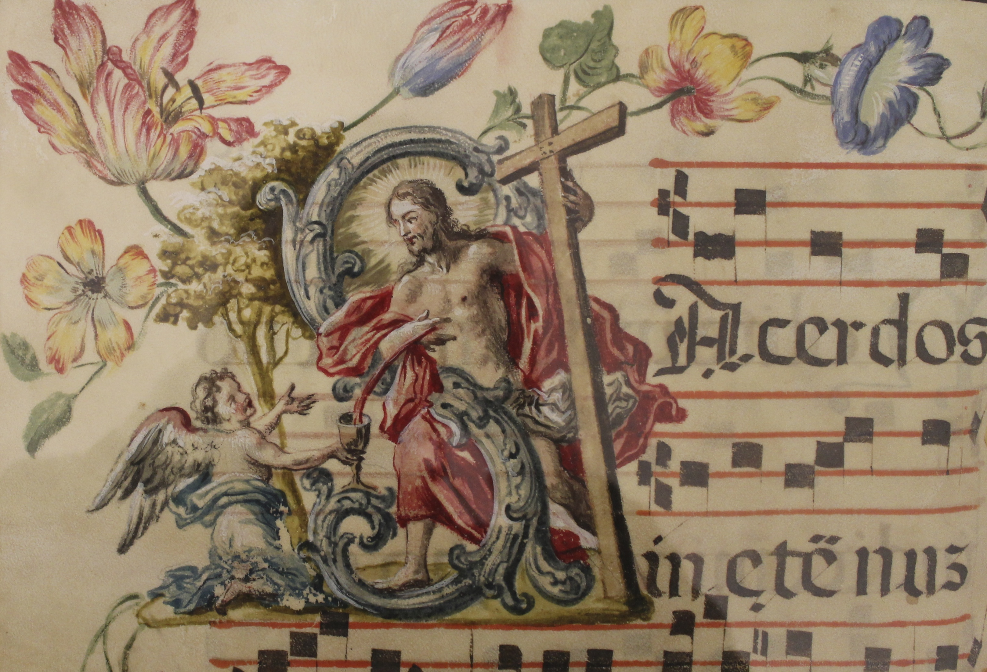 Capolettera miniato da un libro corale del 1720 conservato presso il Convento della SS. Trinità di Baronissi. Autore: P. Bernardo da Rometta.